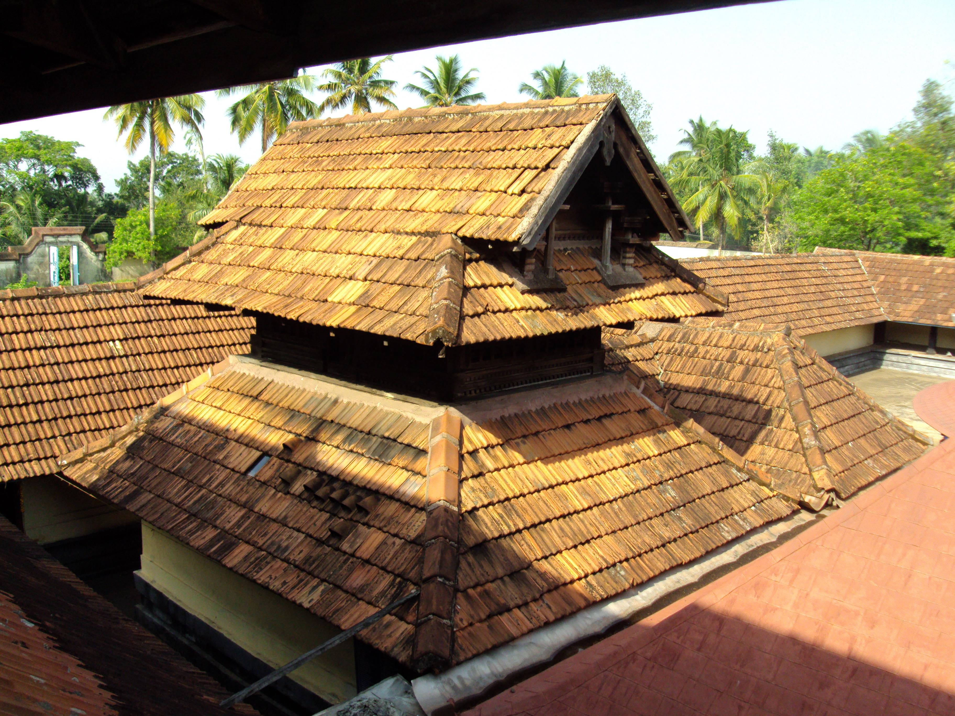 വാഴപ്പള്ളിക്ഷേത്രം